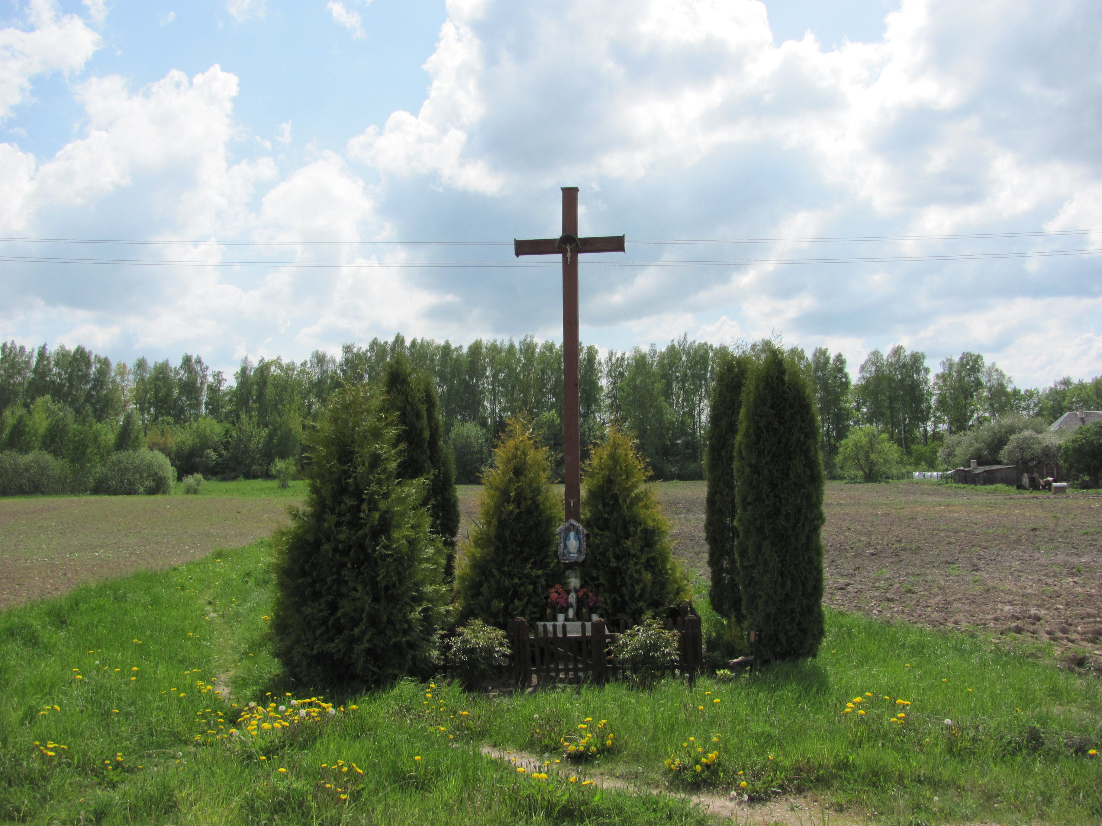 Sadūniškės, Lithuania